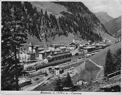 Postcard